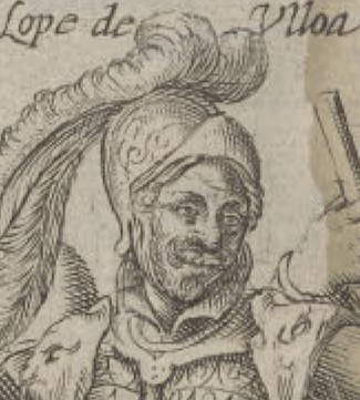 Lope de Ulloa y Lemos: spaniar governator of Chile (1618 - 1620) // gobernador español de Chile entre 1618 y 1620.